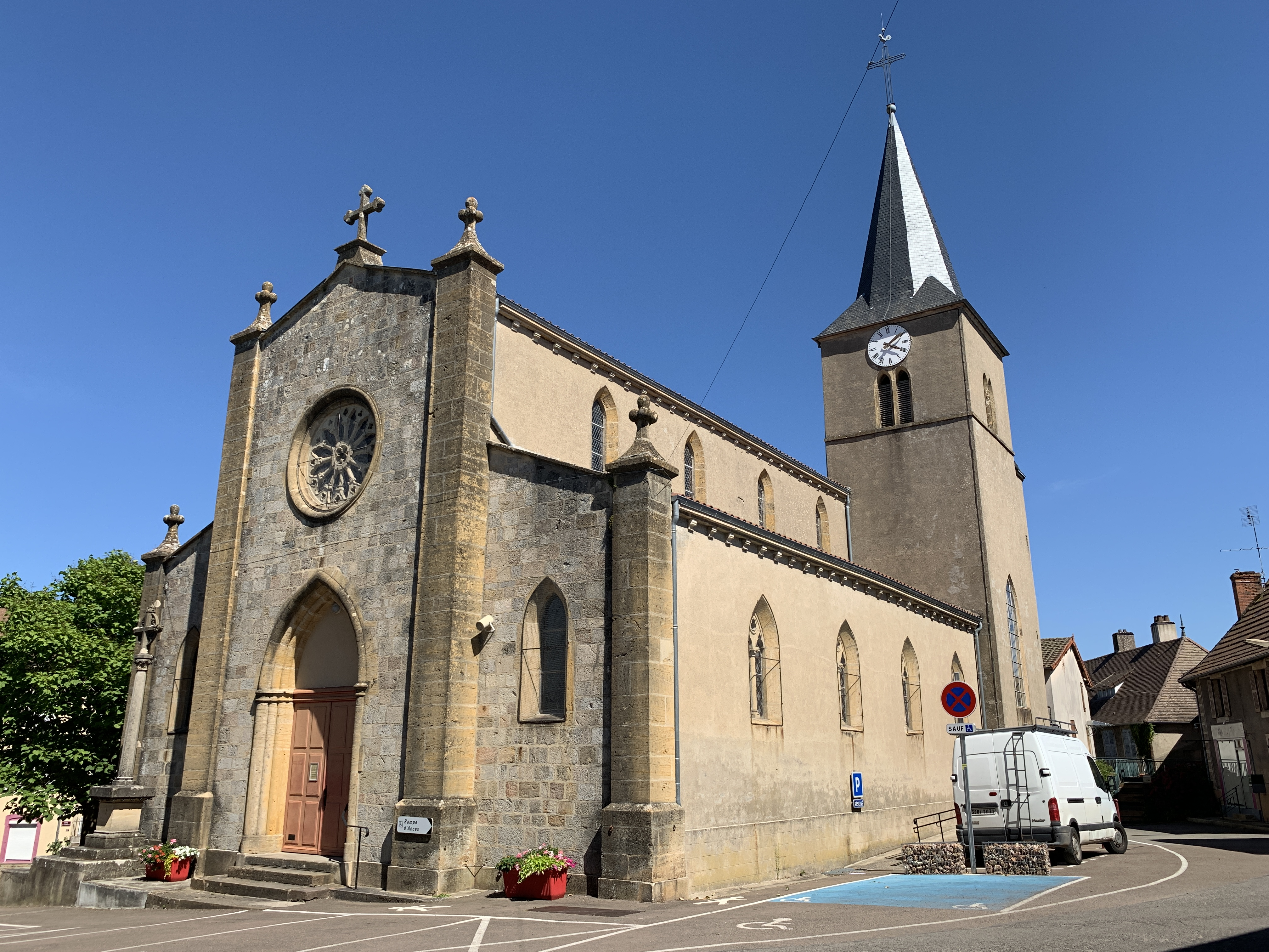 Église Saint-Antoine de Dompierre-les-Ormes.